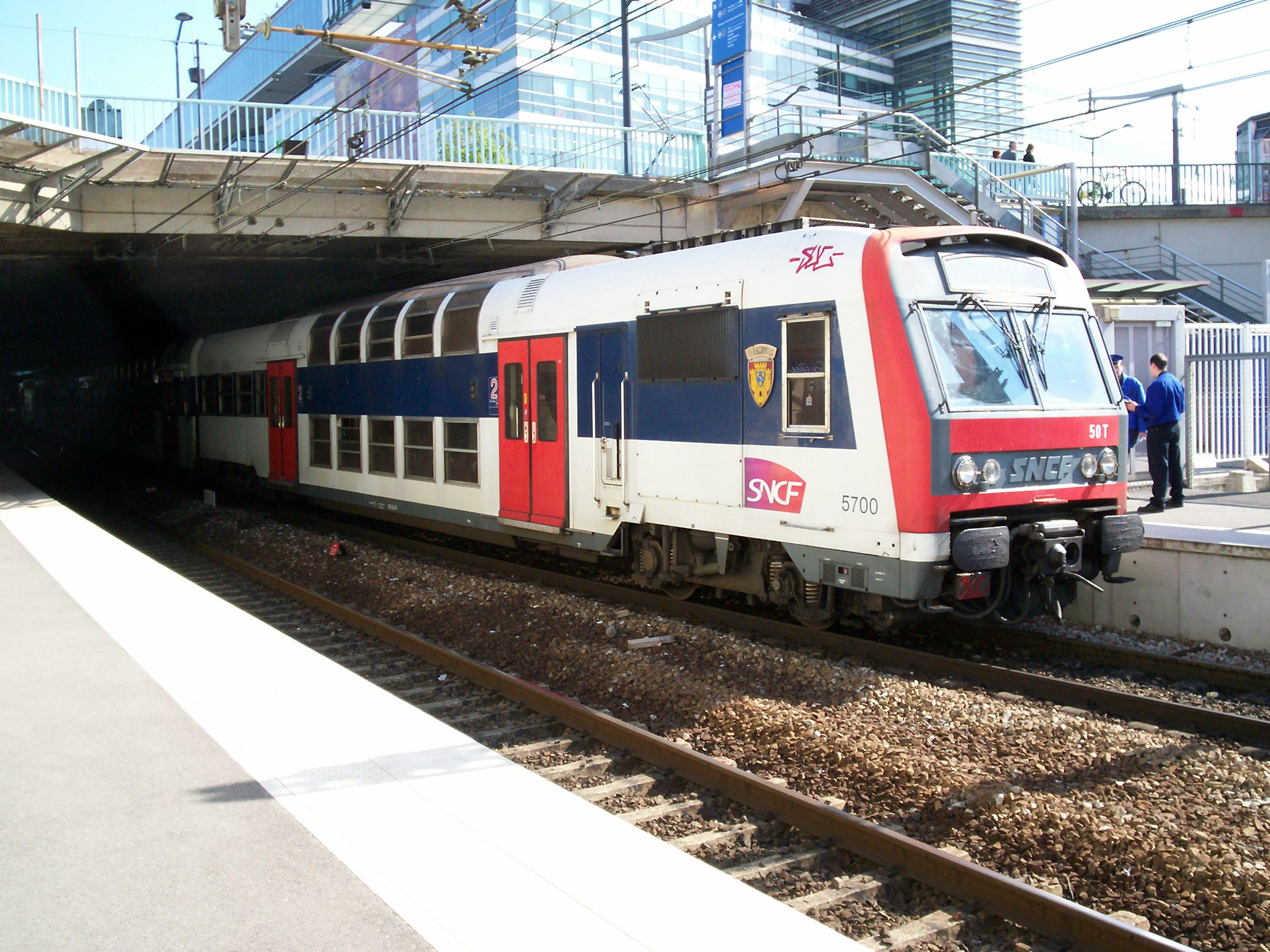 Gare du Pont du Garigliano